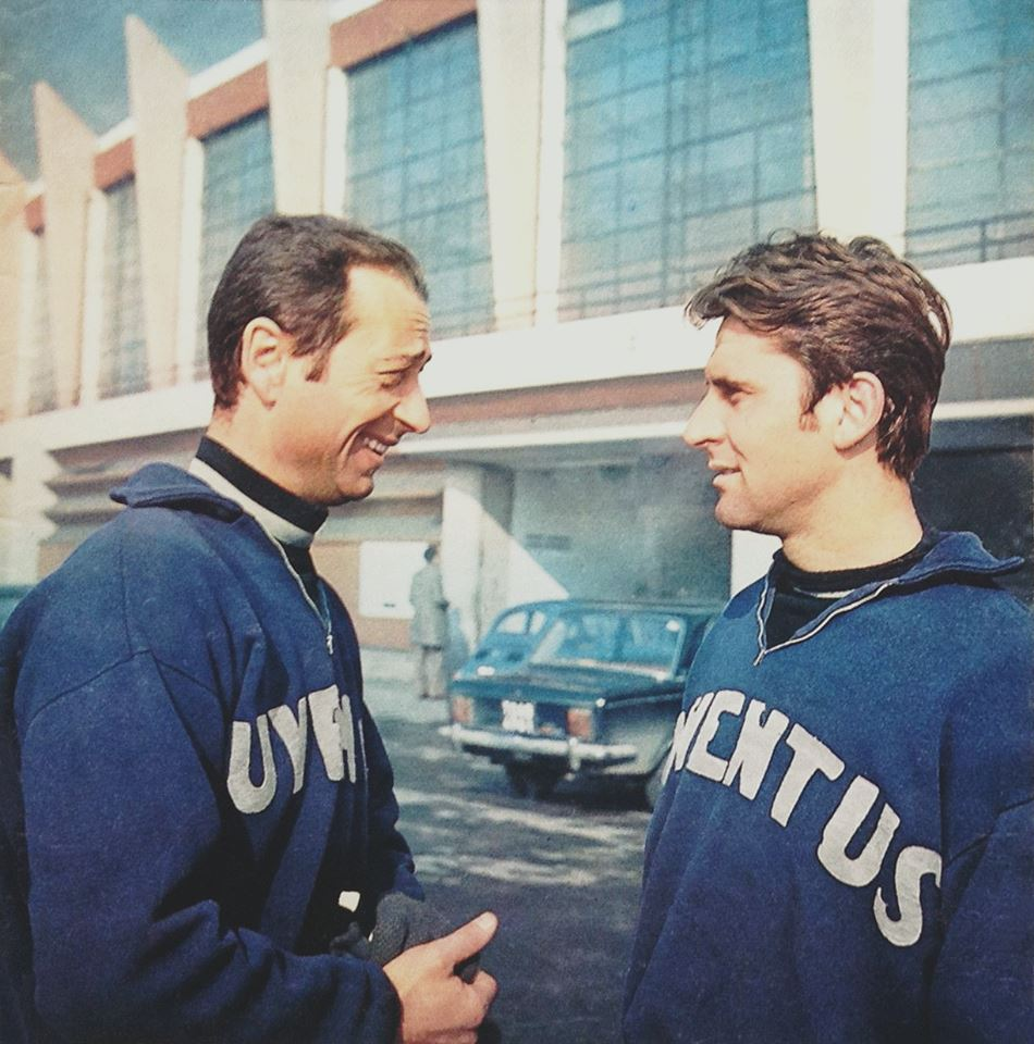 Giuliano Sarti (a sinistra) e Roberto Anzolin (a destra), i due portieri della Juventus per la stagione 1968-69, discutono fuori dallo stadio Comunale di Torino (sullo sfondo), durante una pausa di allenamento nel vicino Campo Combi.